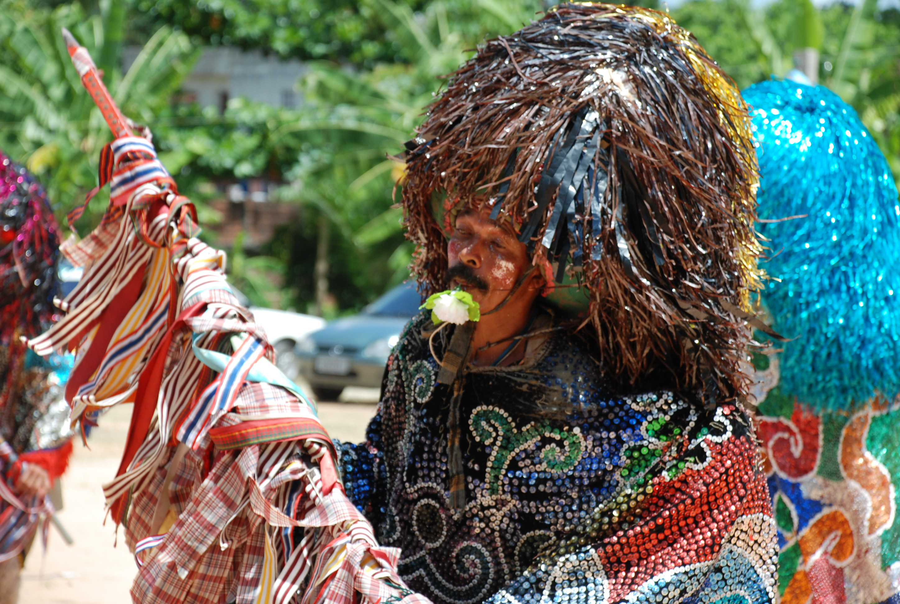 Caboclo de lança, personagem dançarino do maracatu rural, do folclore e carnaval de Pernambuco.